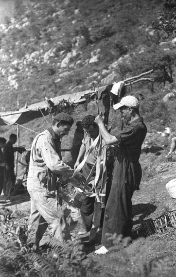 Aitzbeltz leizea esploratzeko operazioa (1955). Ezkerrean, Felix Ruiz de Arkaute.